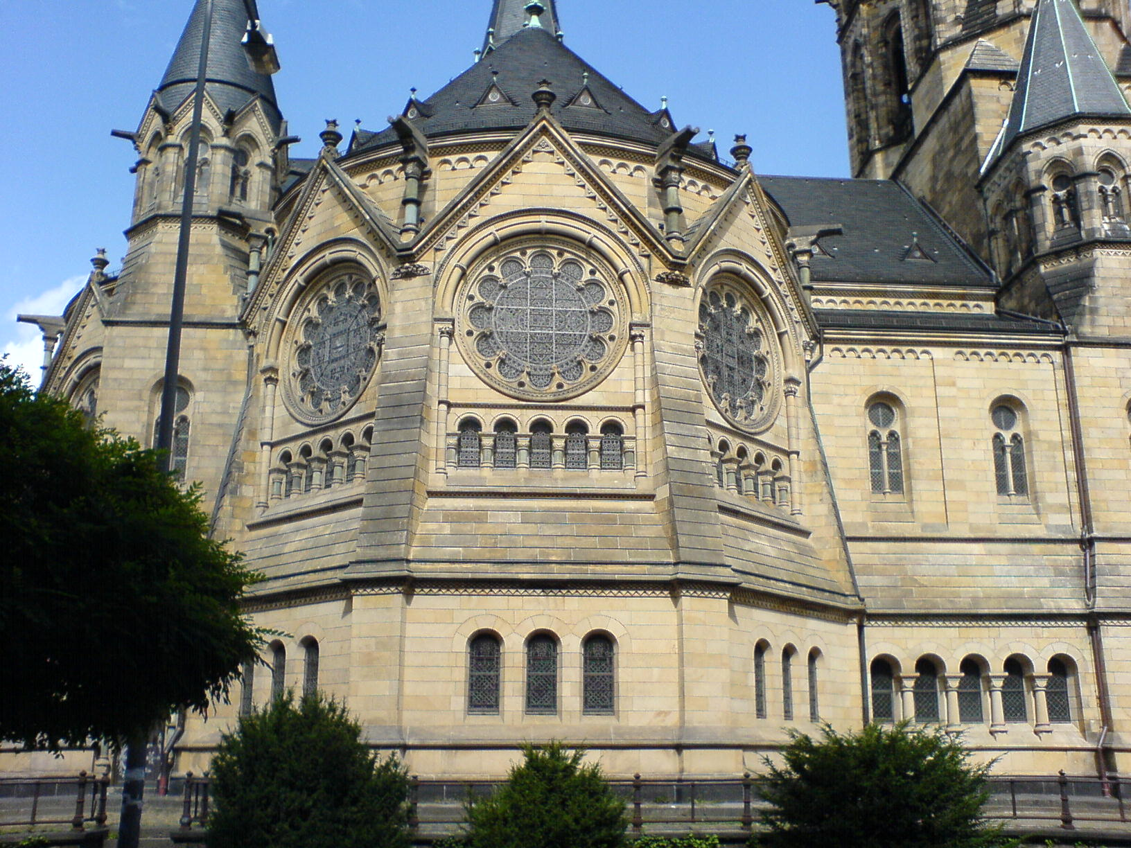 Das Bild zeigt Details der Ringkirche in Wiesbaden: Südseite mit Konche (mit ihren 3 Fenster-Rosetten) und Pseudolanghaus (rechts). Baujahr der Ringkirche: 1894. Vgl. auch Wiesbadener Programm.